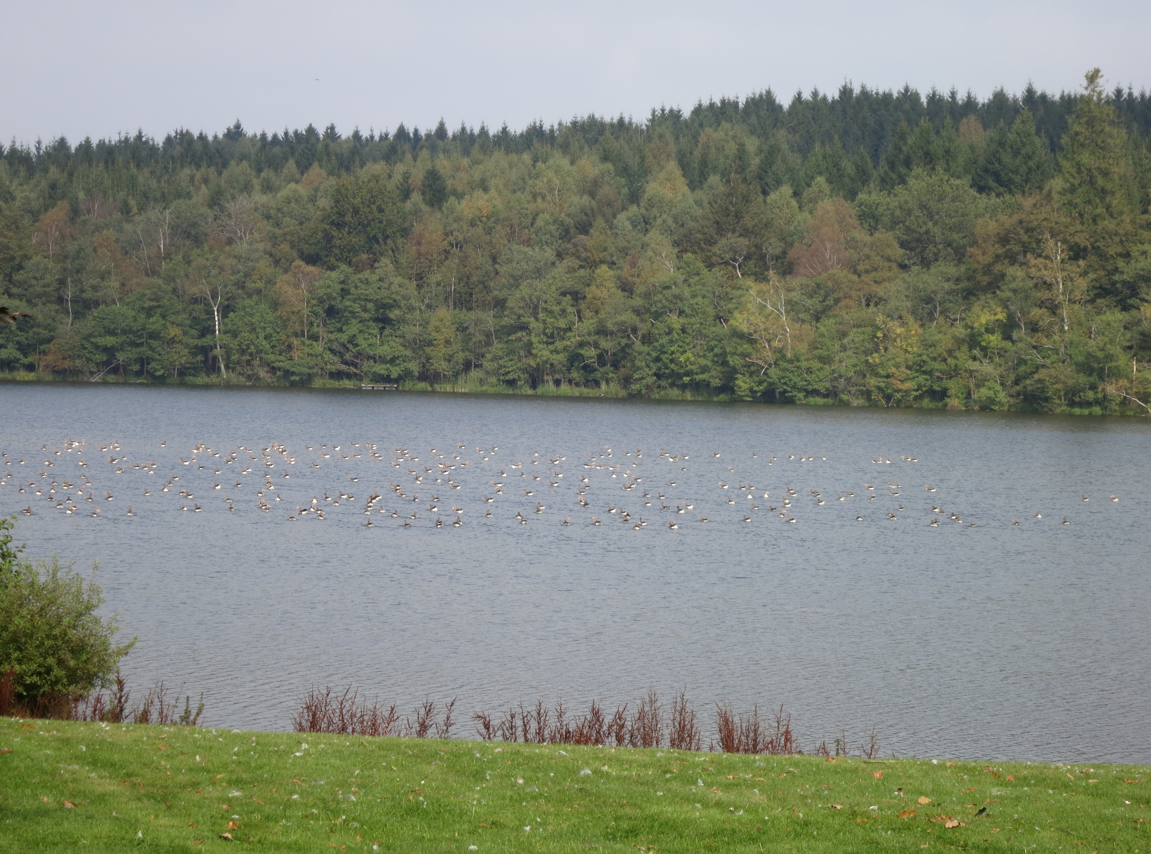 Sövdeborgssjön